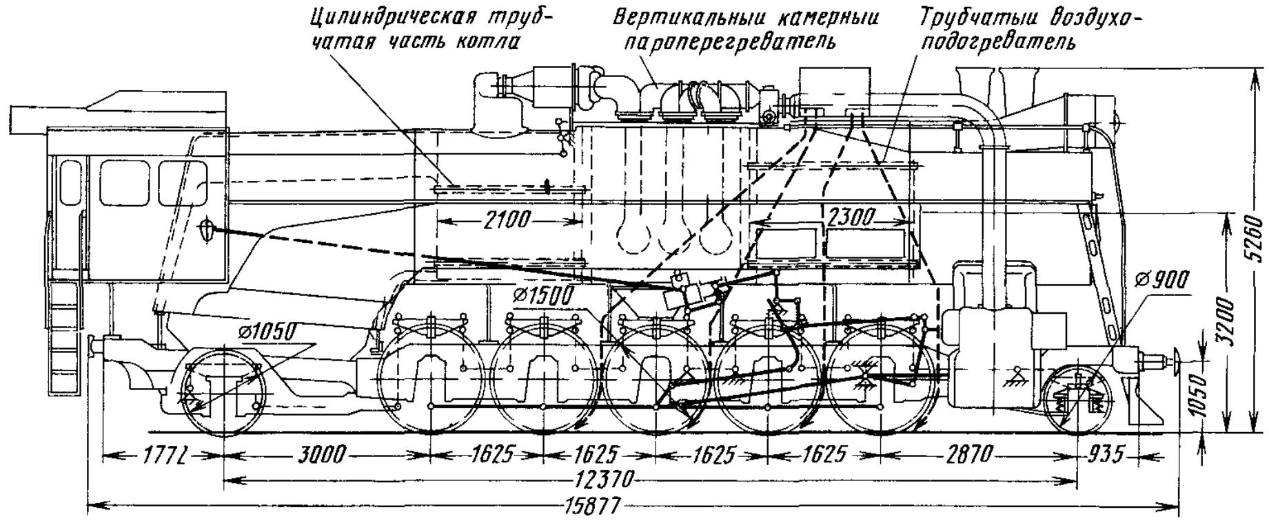 Схема паровоза ФД21-3128м с высокоэкономичным котлом конструкции Сыромятникова